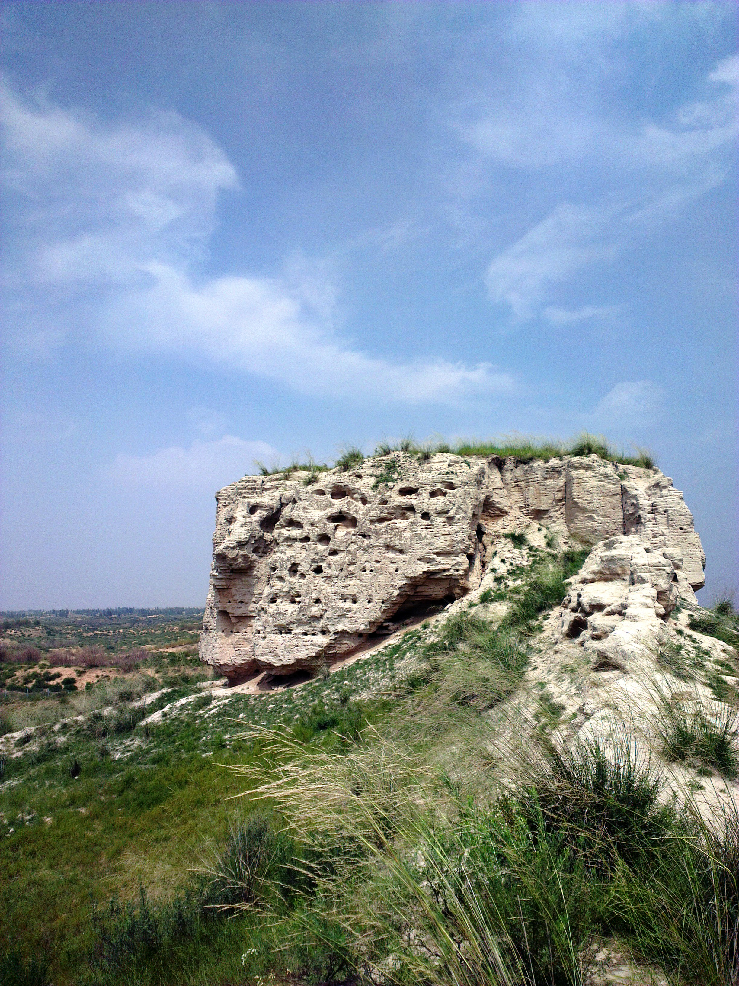 中文（中国大陆）: 陕西榆林靖边统万城遗址